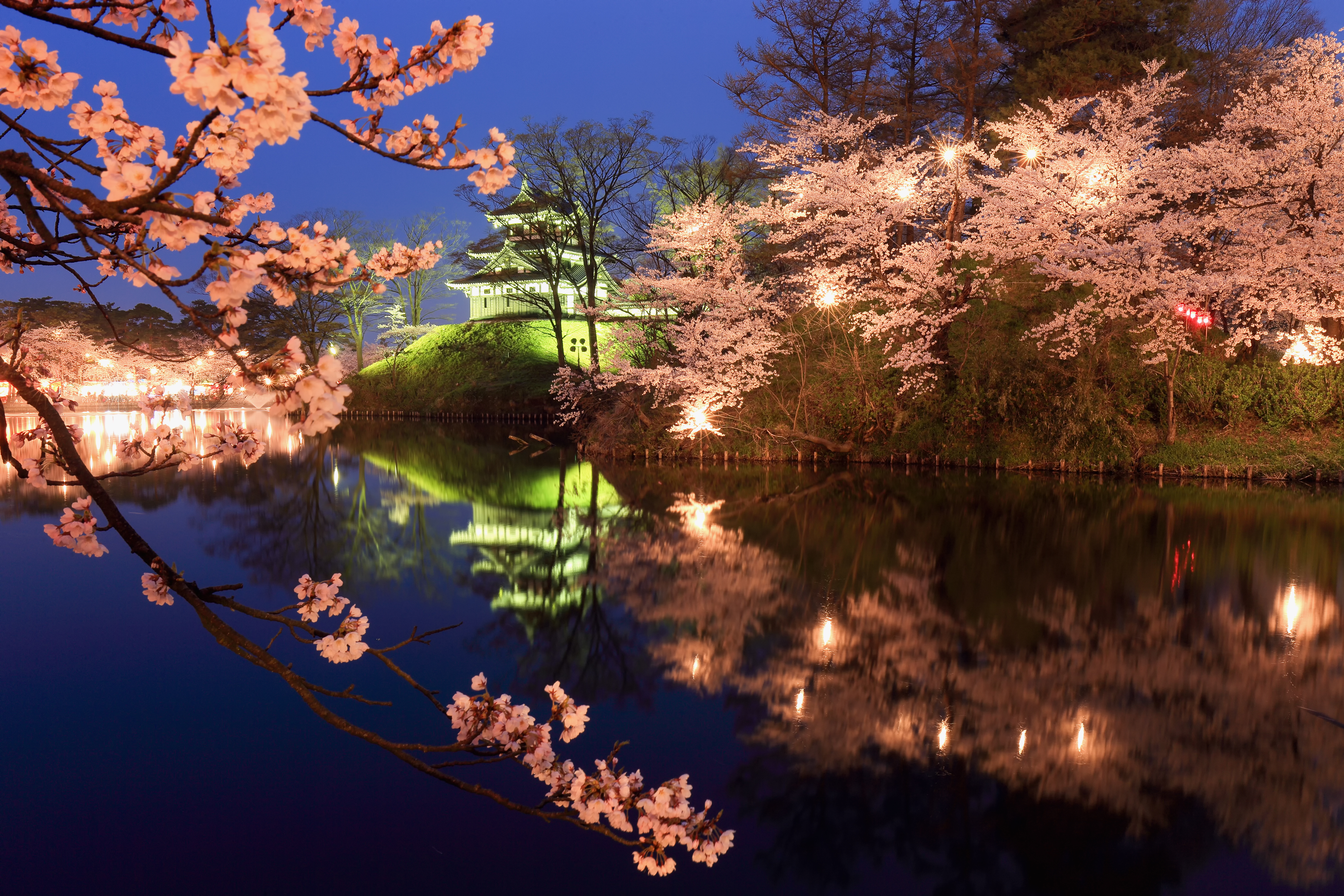 毎年4月に新潟県上越市で開催される高田城址公園観桜会の、夜桜と越後高田城三重櫓のライトアップ。上野恩賜公園、弘前公園と共に、三大夜桜と呼ばれる。